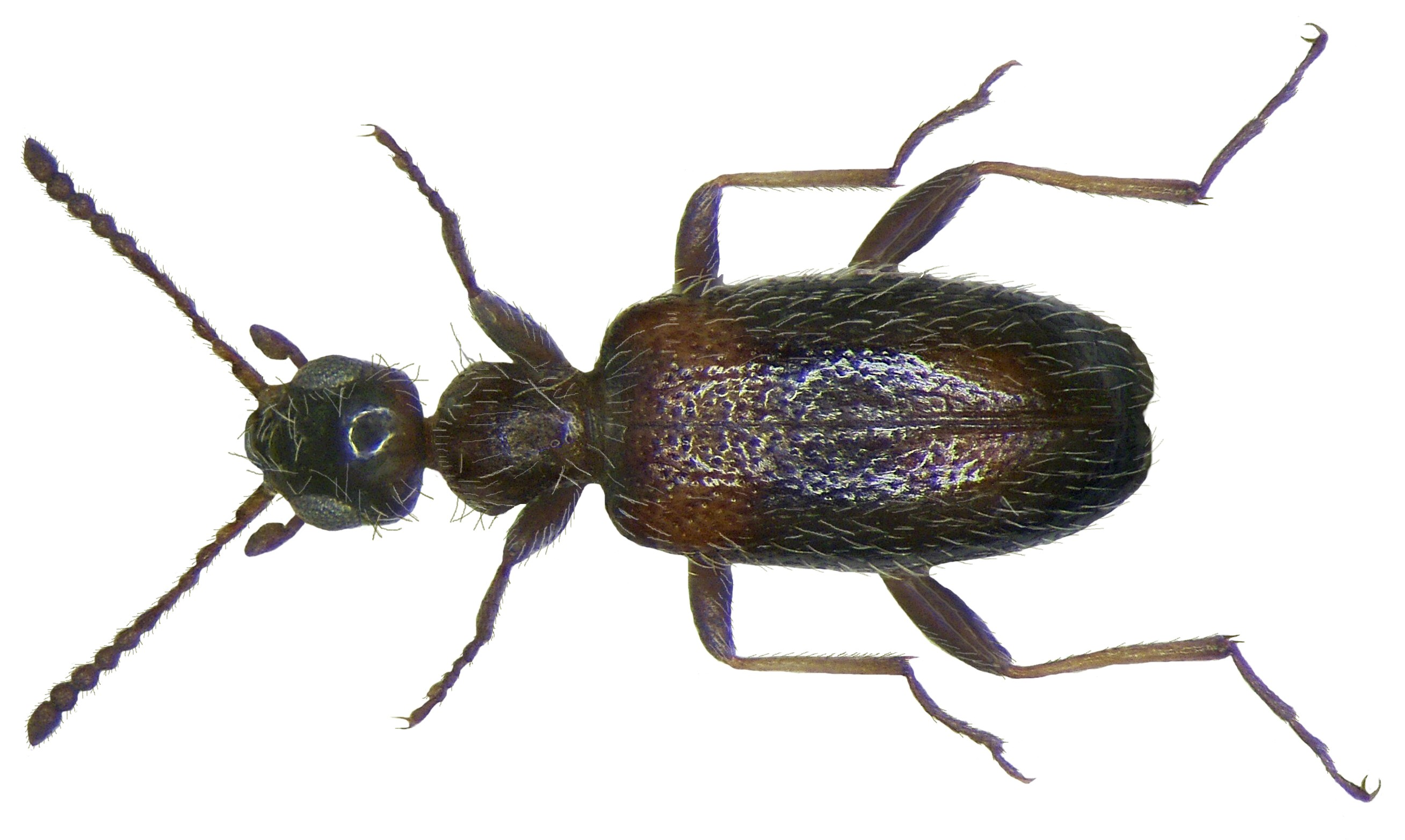 Anthicus crinitus Familie: Anthicidae Größe: 3 mm Fundort: Gambia, Serekunda leg. U.Schmidt, 1990; det. D.Telnov, 2008 Foto: U.Schmidt, 2008